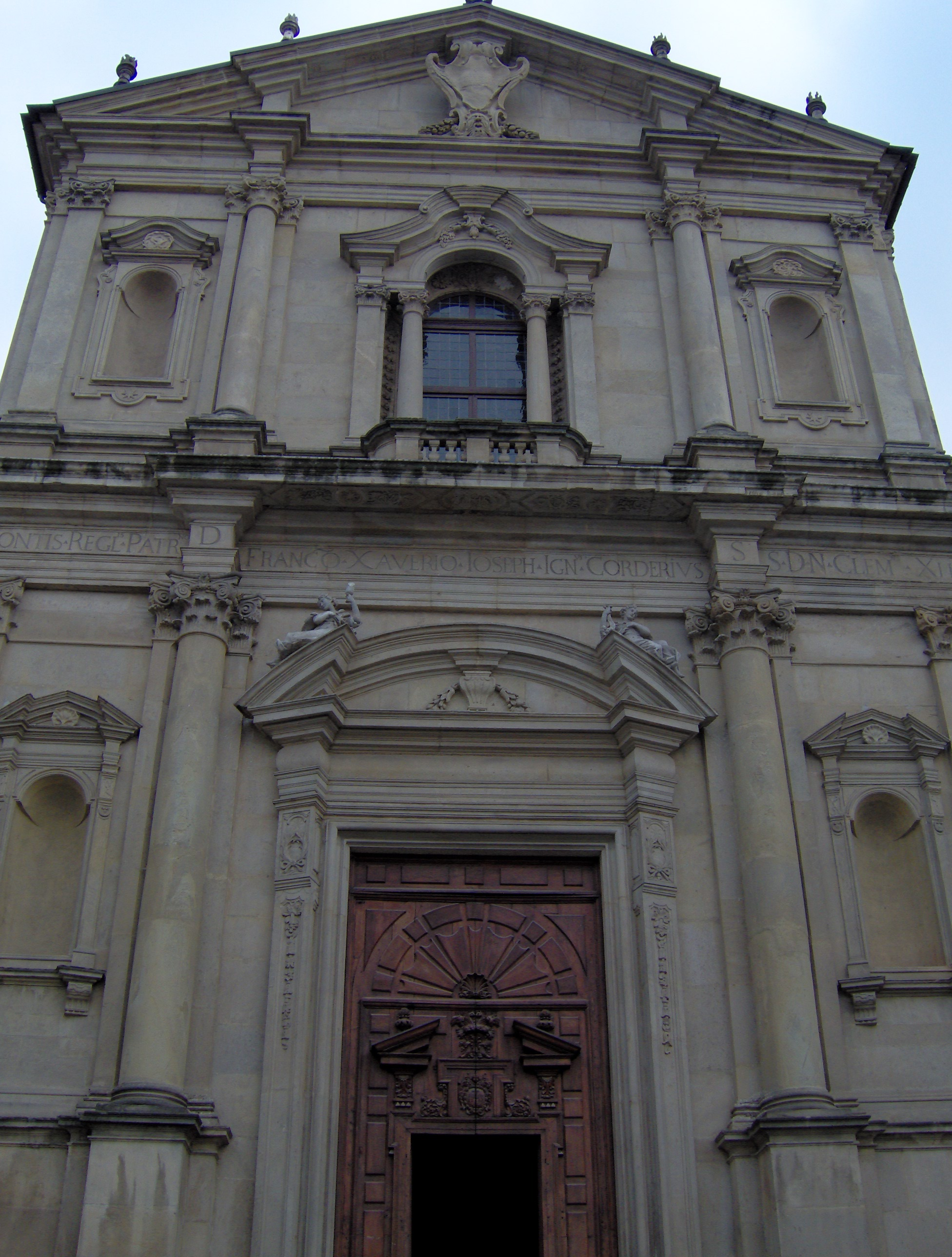 Mondovì, Chiesa di S. Francesco Saverio (Chiesa della Missione)